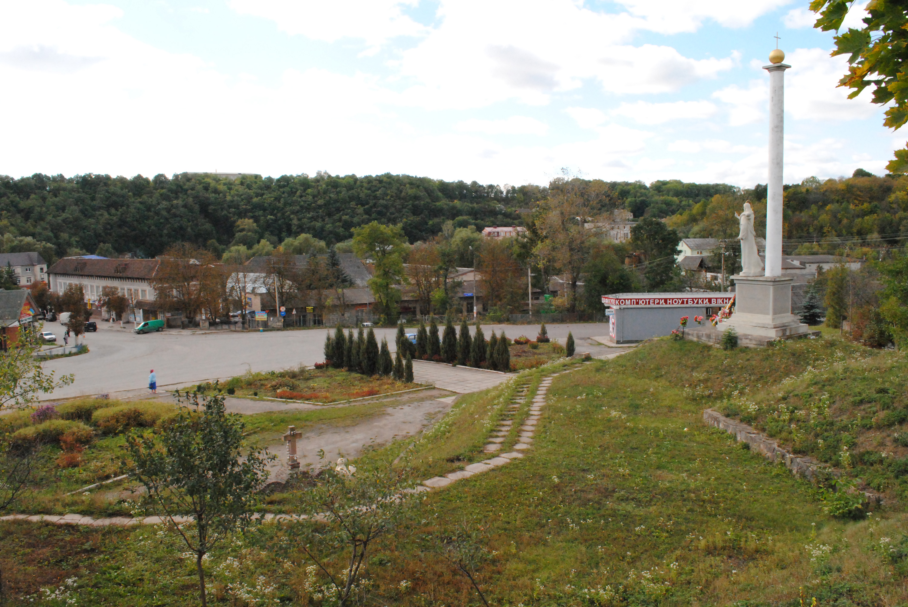 Монумент Христові-Спасителю (Бучач) в Бучачі Тернопільської області на роздоріжжі вулиць генерала Шухевича і Грушевського, т. зв. Чортківському роздоріжжі. Автор — Роман Вільгушинський.